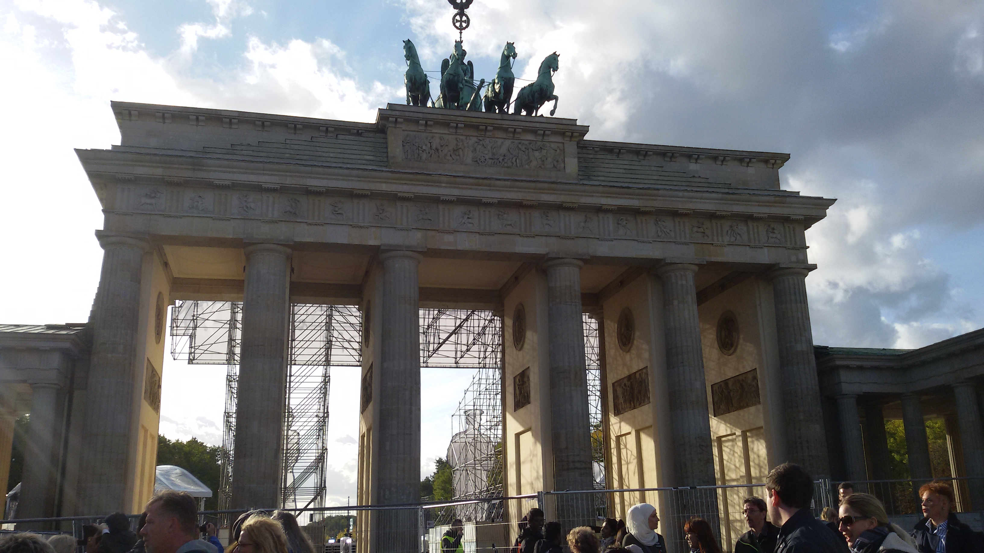 ചരിത്രപ്രസിദ്ധമായ ബ്രാൻഡെൻബർഗ് കവാടം